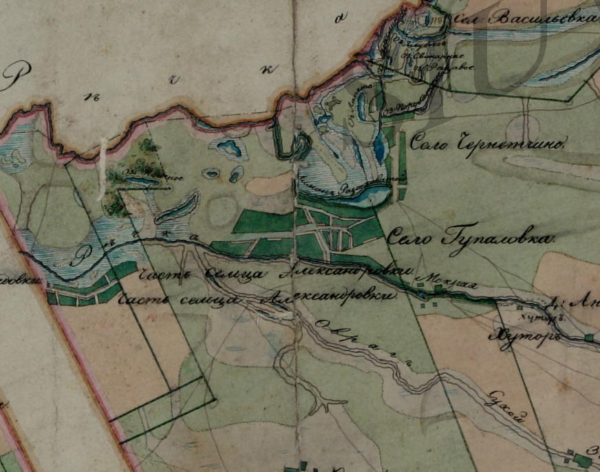 На цій карті зображено с.Гупалівка та територія неподалік в 1790р..